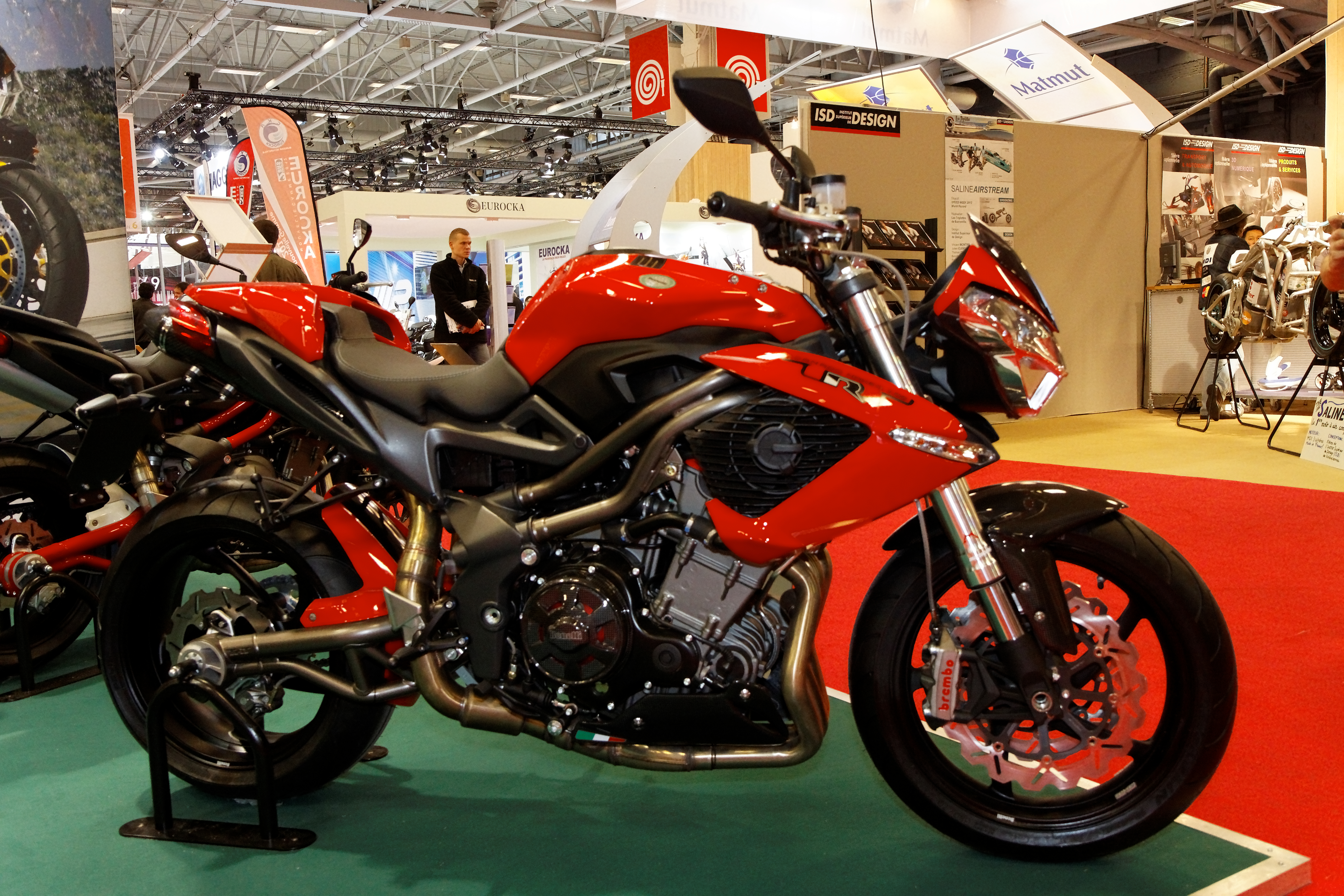 Benelli - TNT